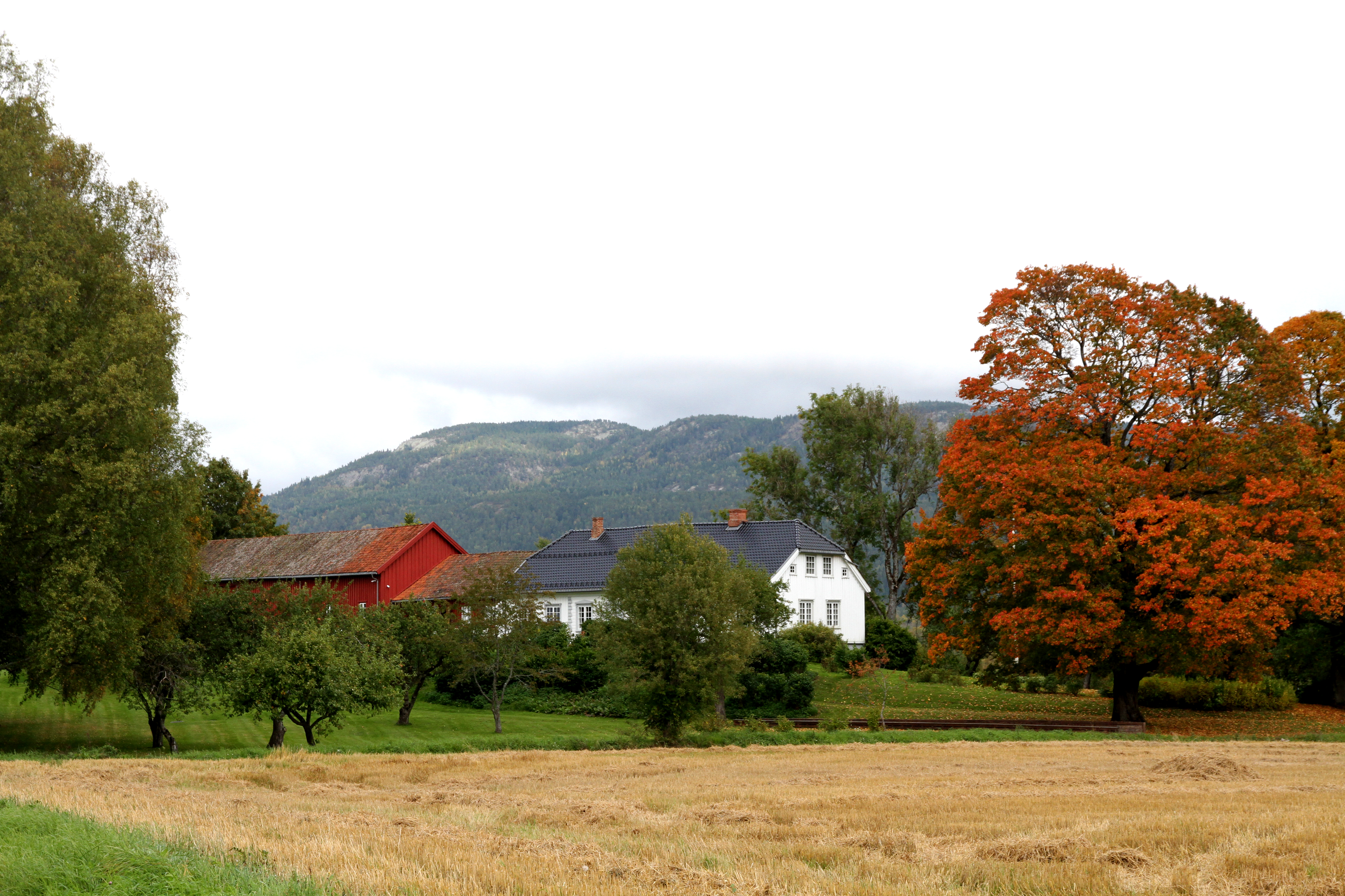 Henrik Ibsen bodde på gården Venstøp fra han var sju til 15 år. I dag er gården Henrik Ibsen Museum som er en del av Telemark Museum.